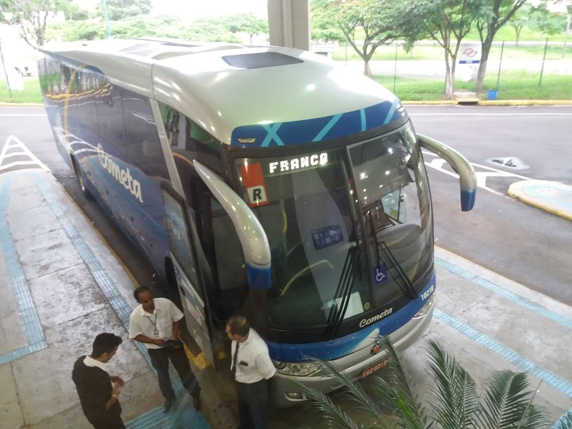 Rodoviaria de Franca, ônibus da Viação Cometa (carro 10218), Franca (SP), Brasil